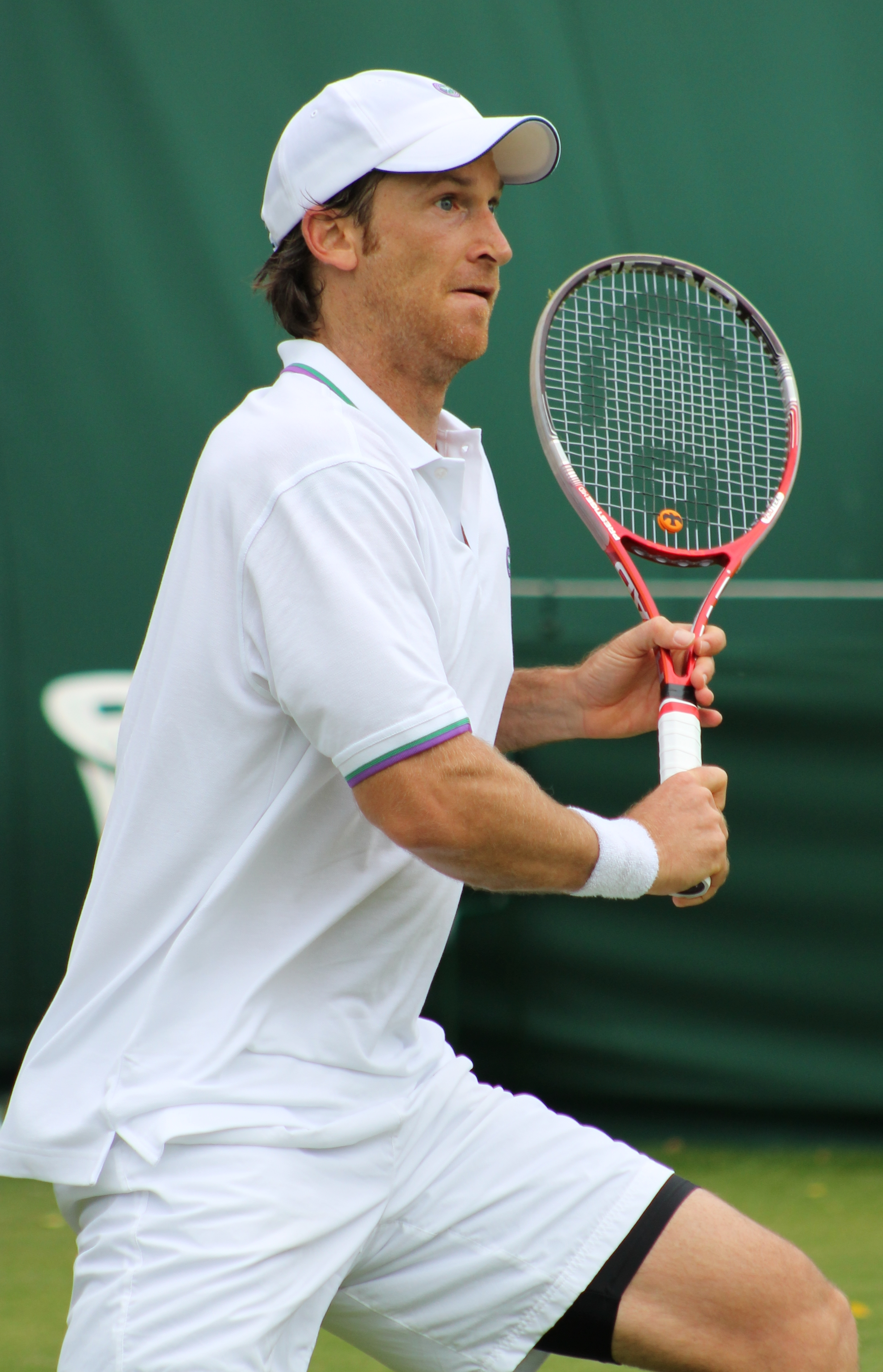 Ghem WMQ14 (12)